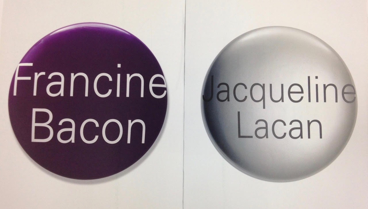 Badges de l'oeuvre Portraits grandeur nature